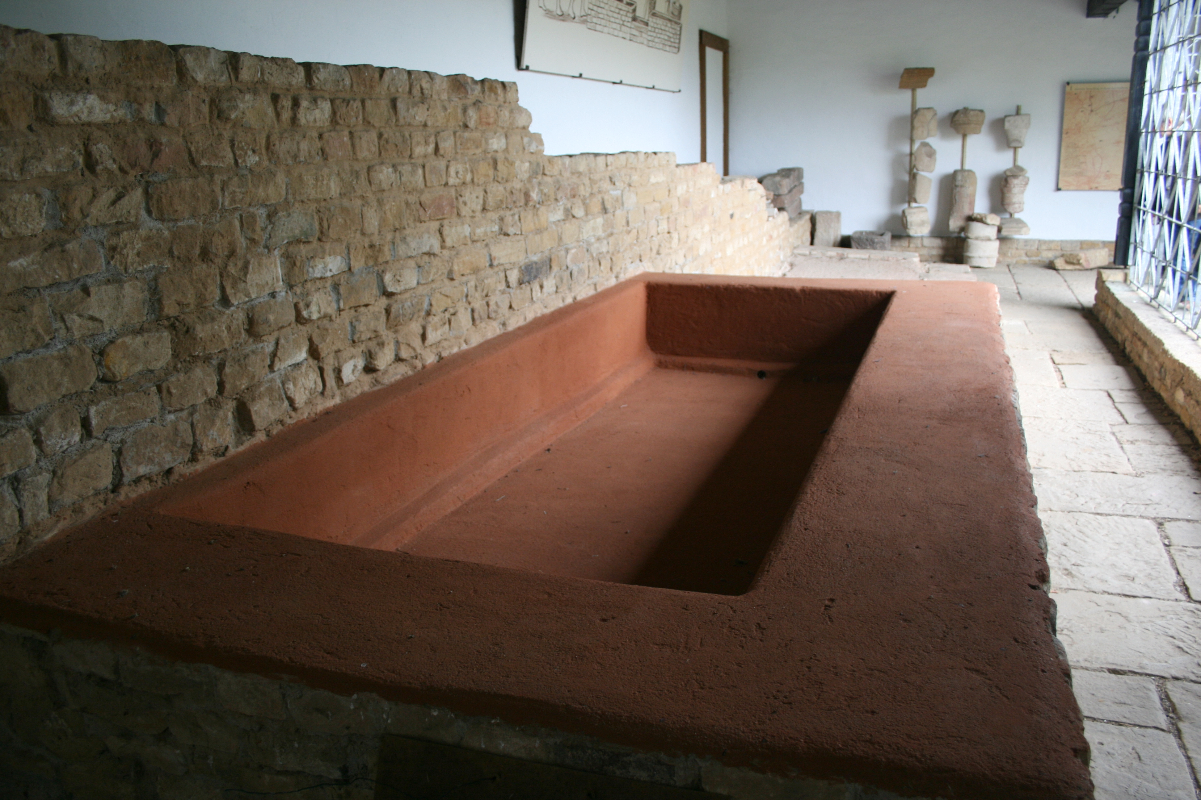 Rekonstruierte römische Kelteranlage in der römischen Villa Weilberg bei Bad Dürkheim-Ungstein. Im Hintergrund gefundene Steindenkmäler.